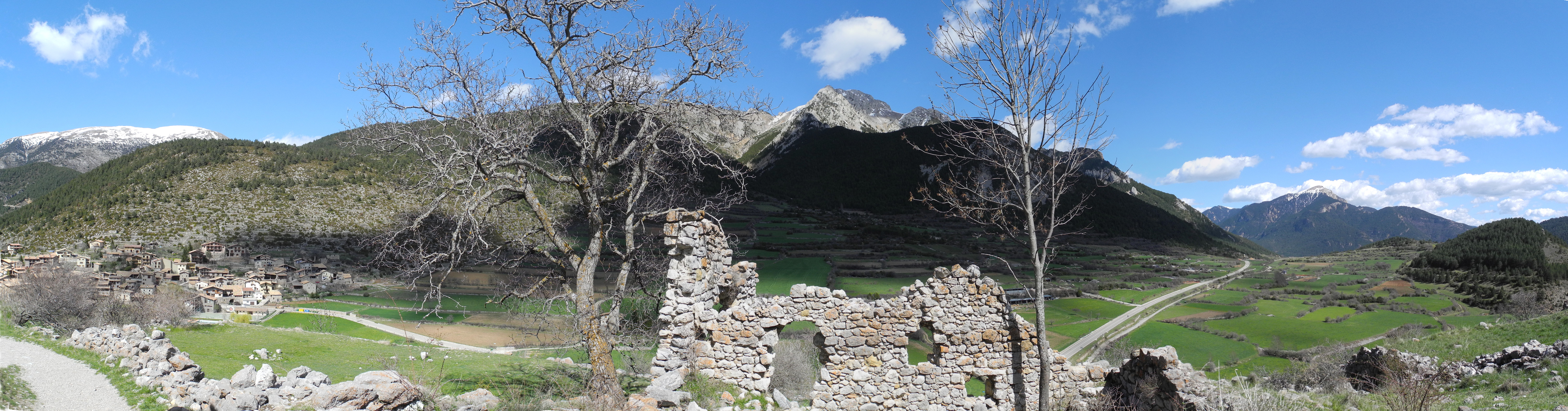 Vista panoràmica des del castell de Gósol. A l'esquerra: el poble de Gósol. Al centre: el massis del Pedraforca. A la dreta: la cadena d'Ensija - Rasos de Peguera.